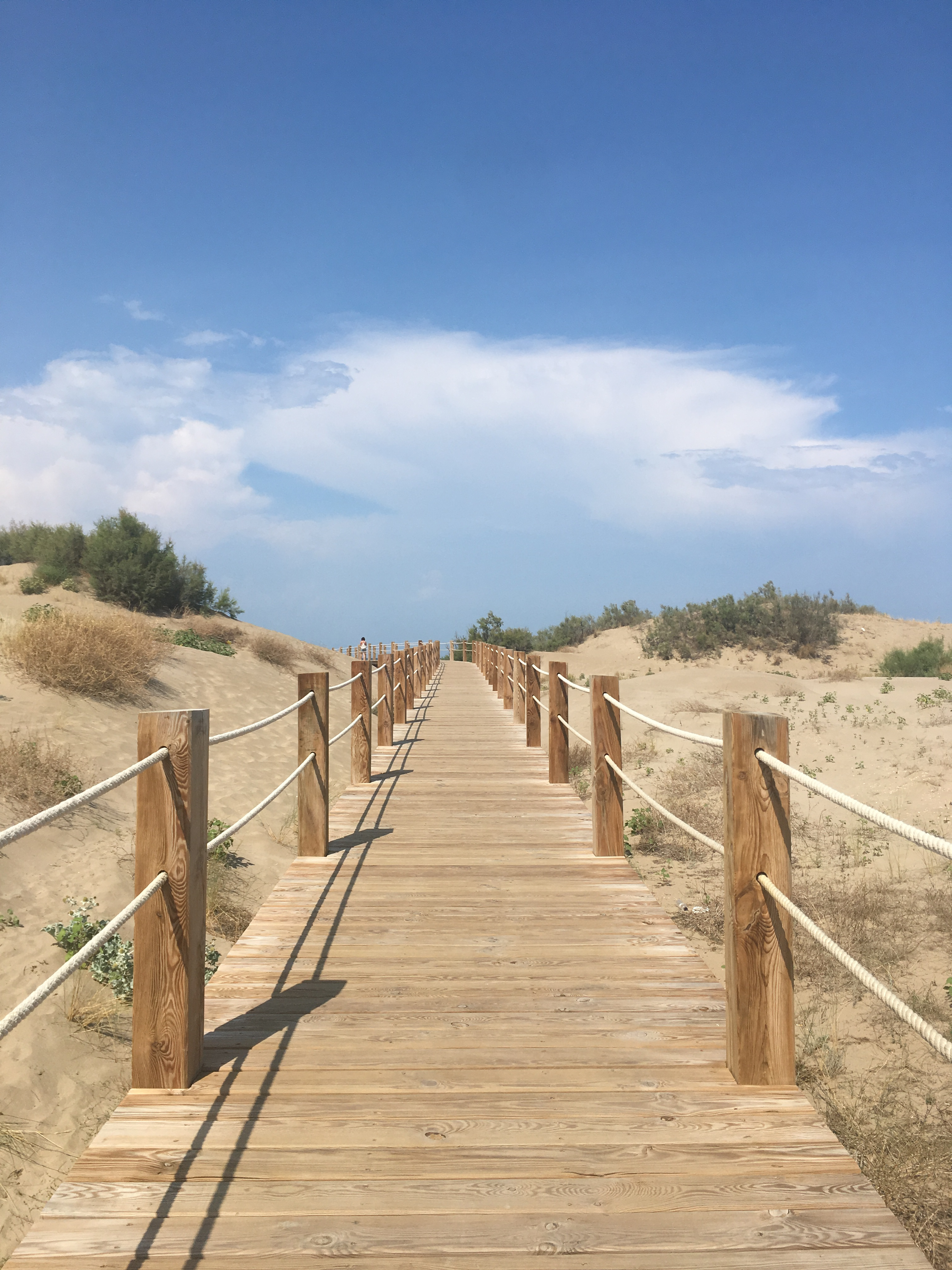 Fotografia d'una de les passarel·les que uneixen el passeig marítim de Riumar amb la platja, travessant les dunes.